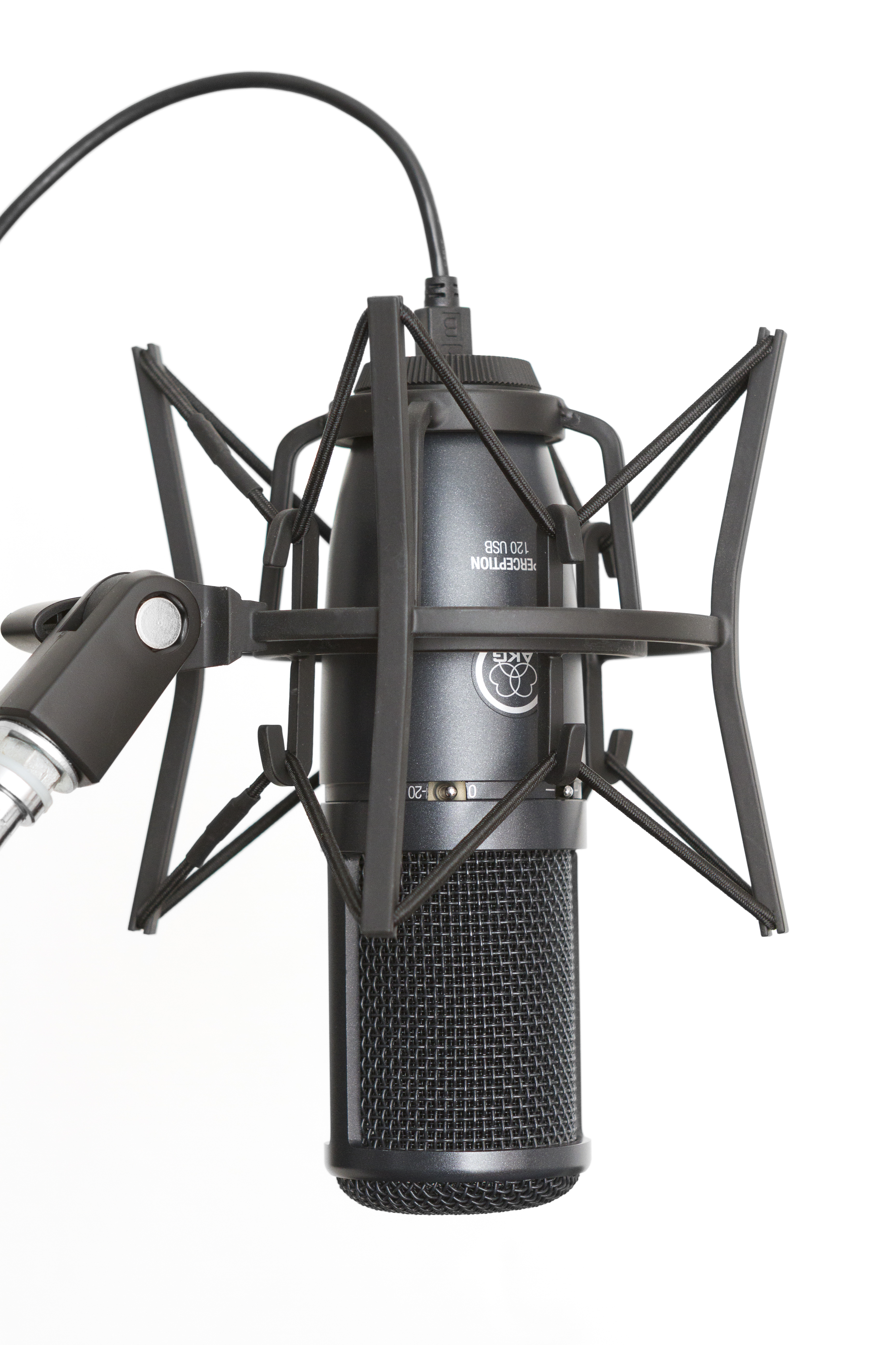 AKG Perception 120 USB Kondensatormikrofon mit SH 100 Mikrofonspinne.